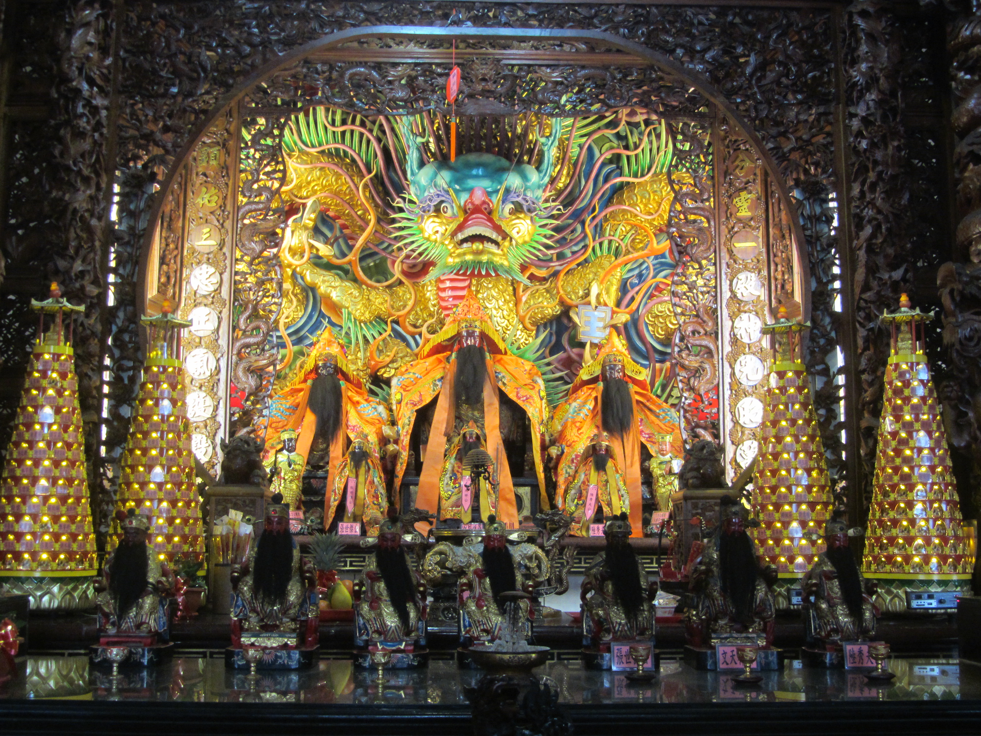 雙溪三忠廟內的文天祥、陸秀夫、張世傑塑像。